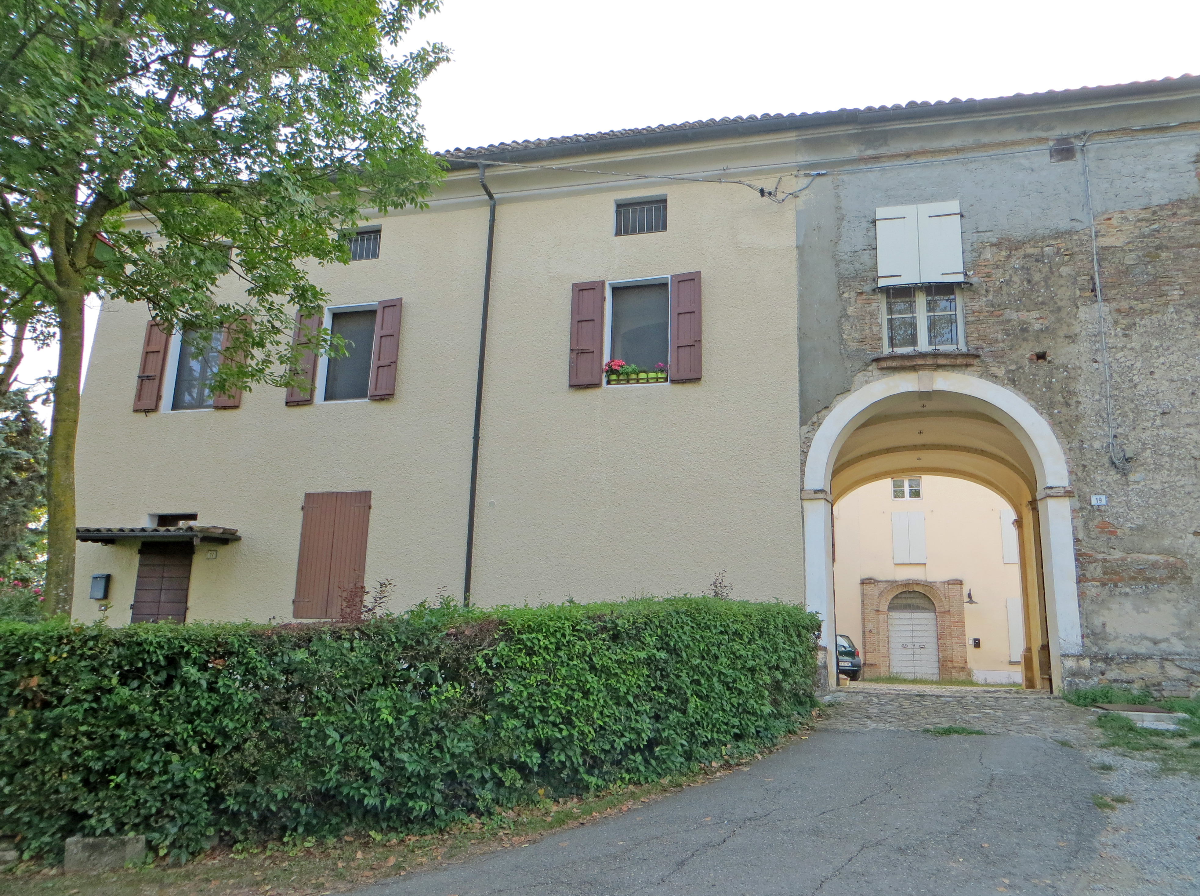 Facciata nord del castello di Segalara This is a photo of a monument which is part of cultural heritage of Italy.